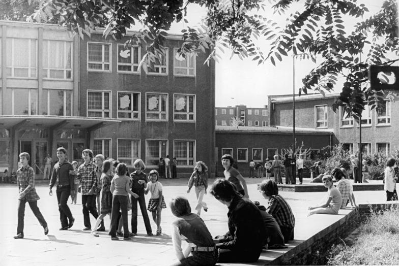 Berlin, Mitte, "Heinrich-Heine-Oberschule", Schulhof ADN-ZB Senft 10.9.79 Berlin: Der Schulalltag hat wieder begonnen- auch für die Jungen und Mädchen, die die Heinrich-Heine-Oberschule in Berlin-Mitte besuchen.